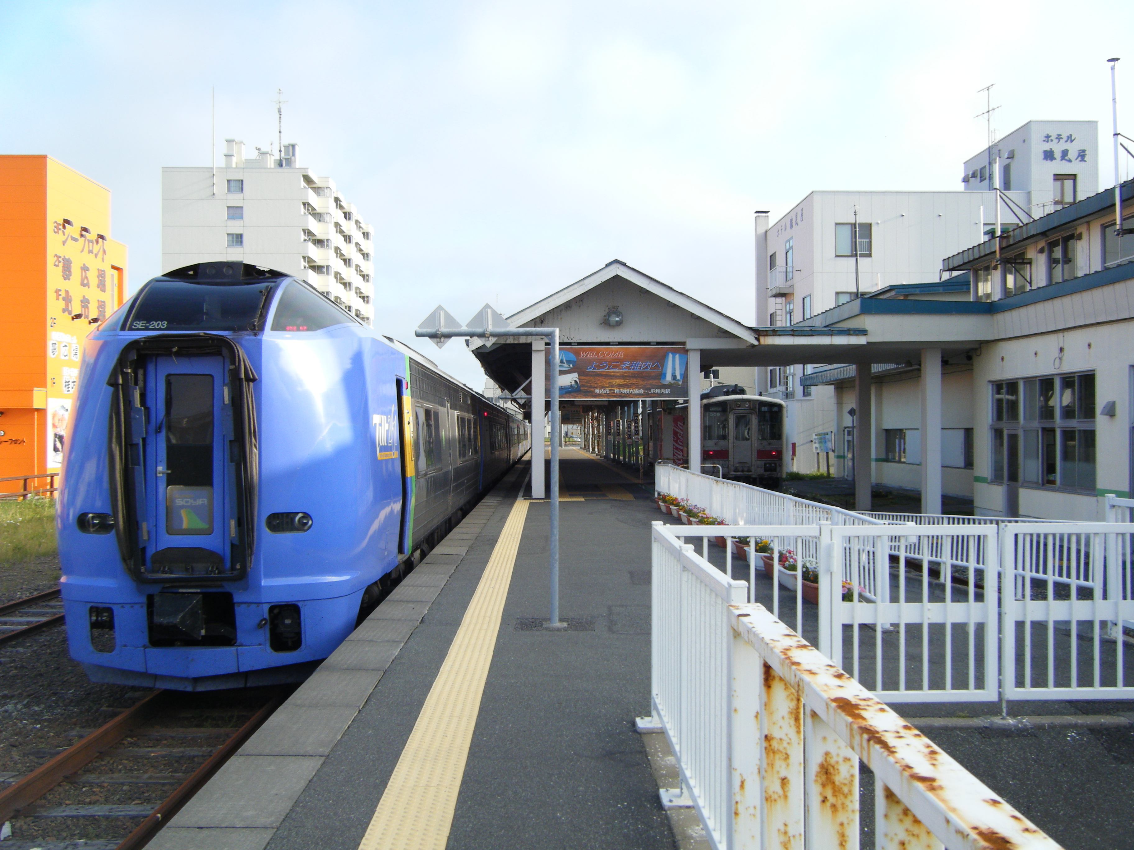 稚内駅（JR北海道 宗谷本線）ホーム。